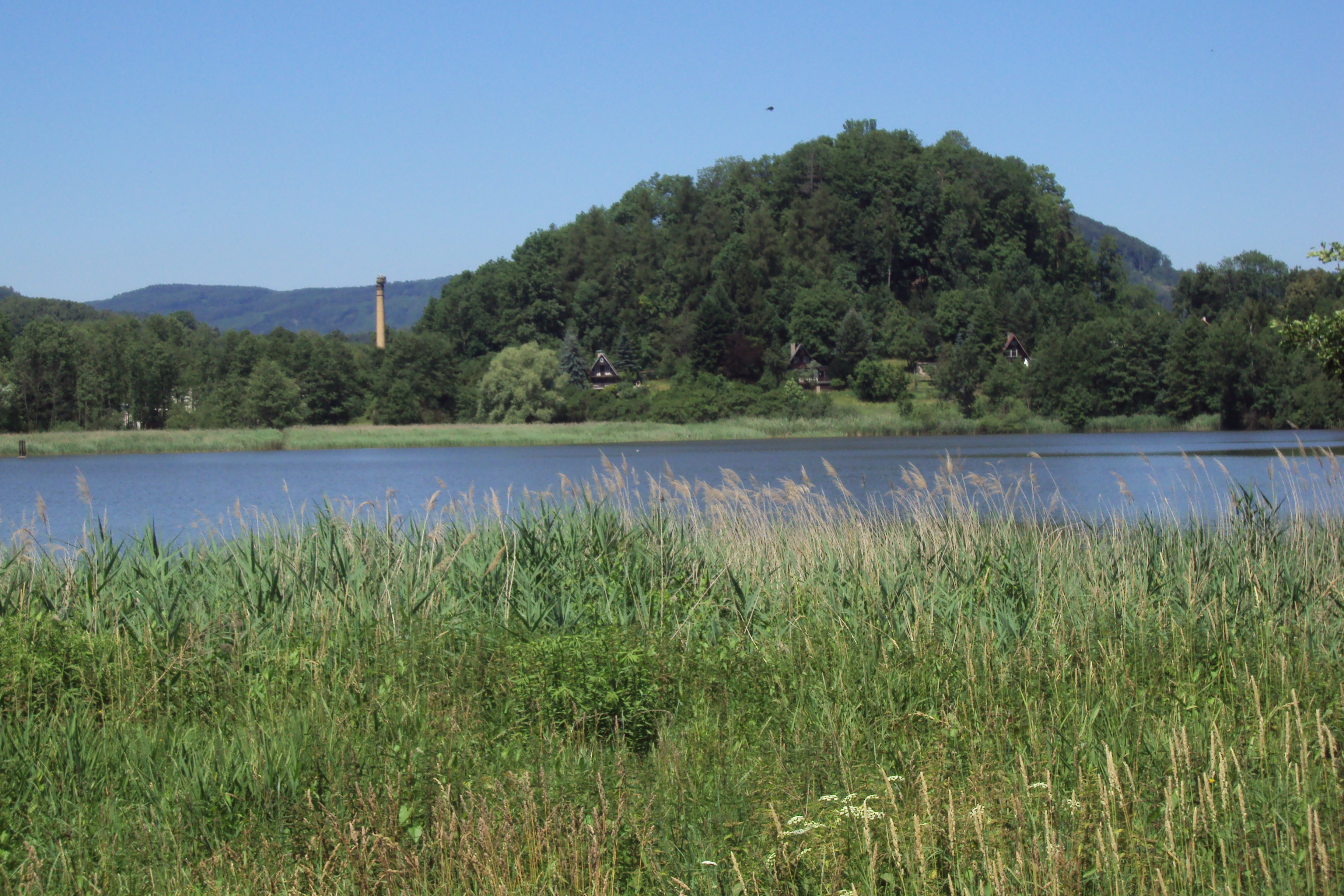 Pivovarský rybník je na okraji obce Pihel u Nového Boru